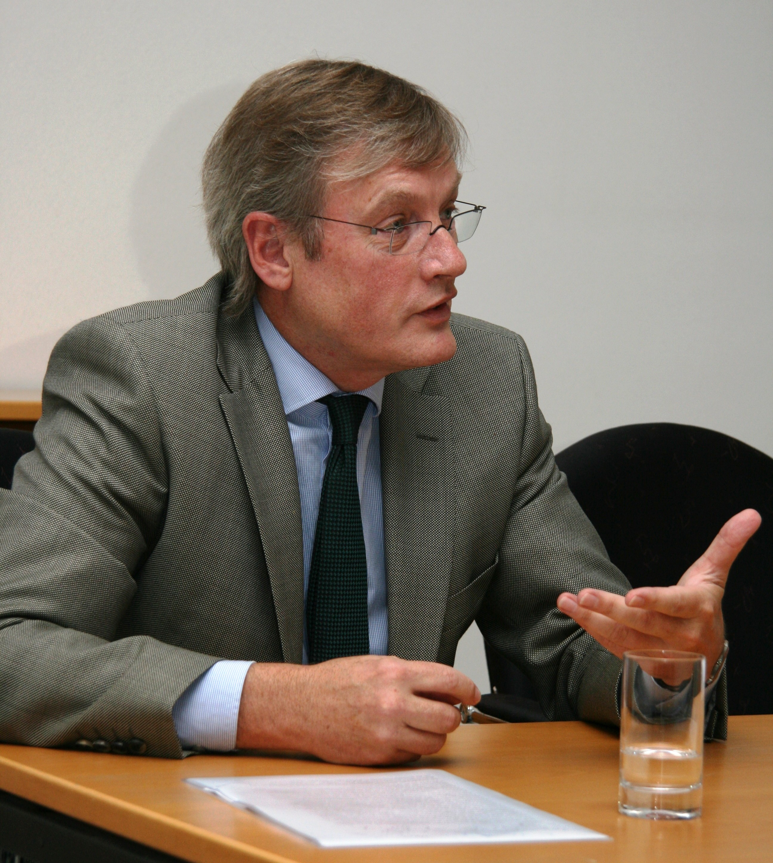 Prof. Dr. Werner Plumpe